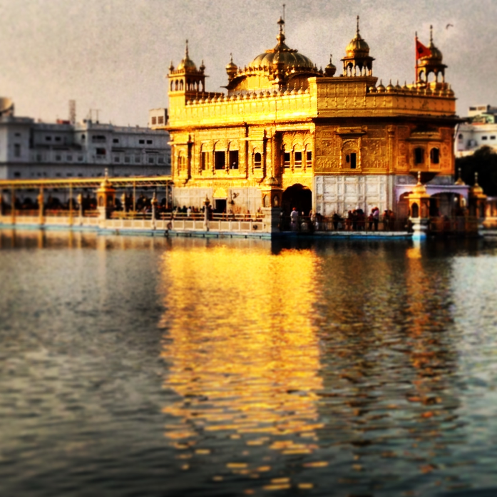 Golden Temple, Amritsar